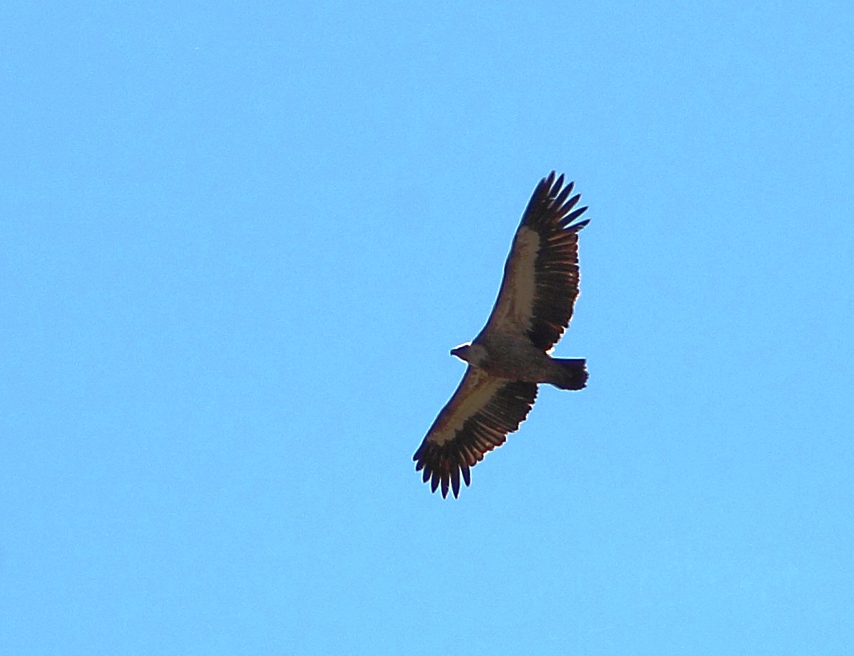 Белоголовый сип в Сочинском национальном парке. Окрестности Красной Поляны. Сочинский национальный парк расположен на южном склоне Большого Кавказа в Краснодарском крае. This image is related to the protected area of Russia number 2300430